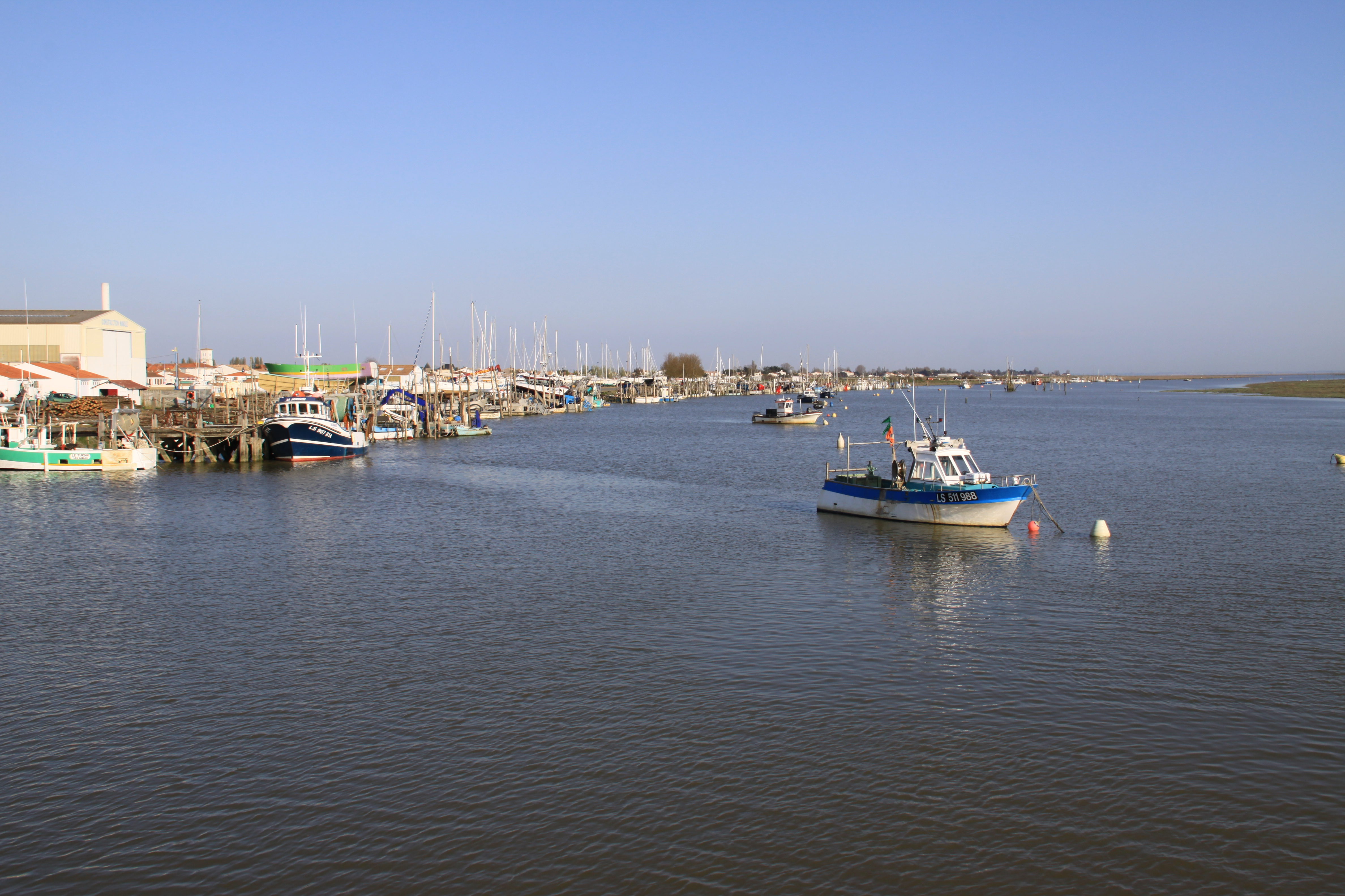 Le port de l' Aiguillon-sur-Mer est situé dans l'estuaire du Lay. Il se déroule le long de la berge. C' est un port qui n'a pas vraiment de quais. Les pontons en bois sont sur pilotis et les emplacements des bateaux sont délimités par des pieux enfoncés dans un sol de vasières (sable humide et vase). Le port subit entièrement le mouvement des marées. A marée basse les embarcations sont donc échouées dans la vase. L' Aiguillon-sur-Mer, Vendée, France.